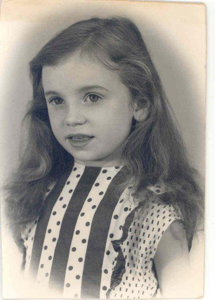 Rúzsa Magdi gyermekkorában.